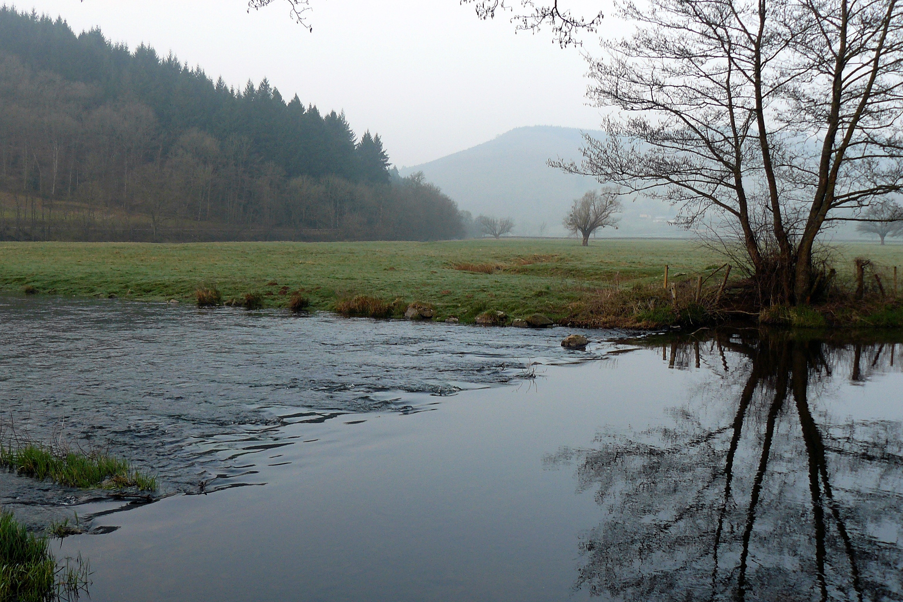 La rivière Ternin près de Lucenay-l'Evêque (Saône-et-Loire, France)